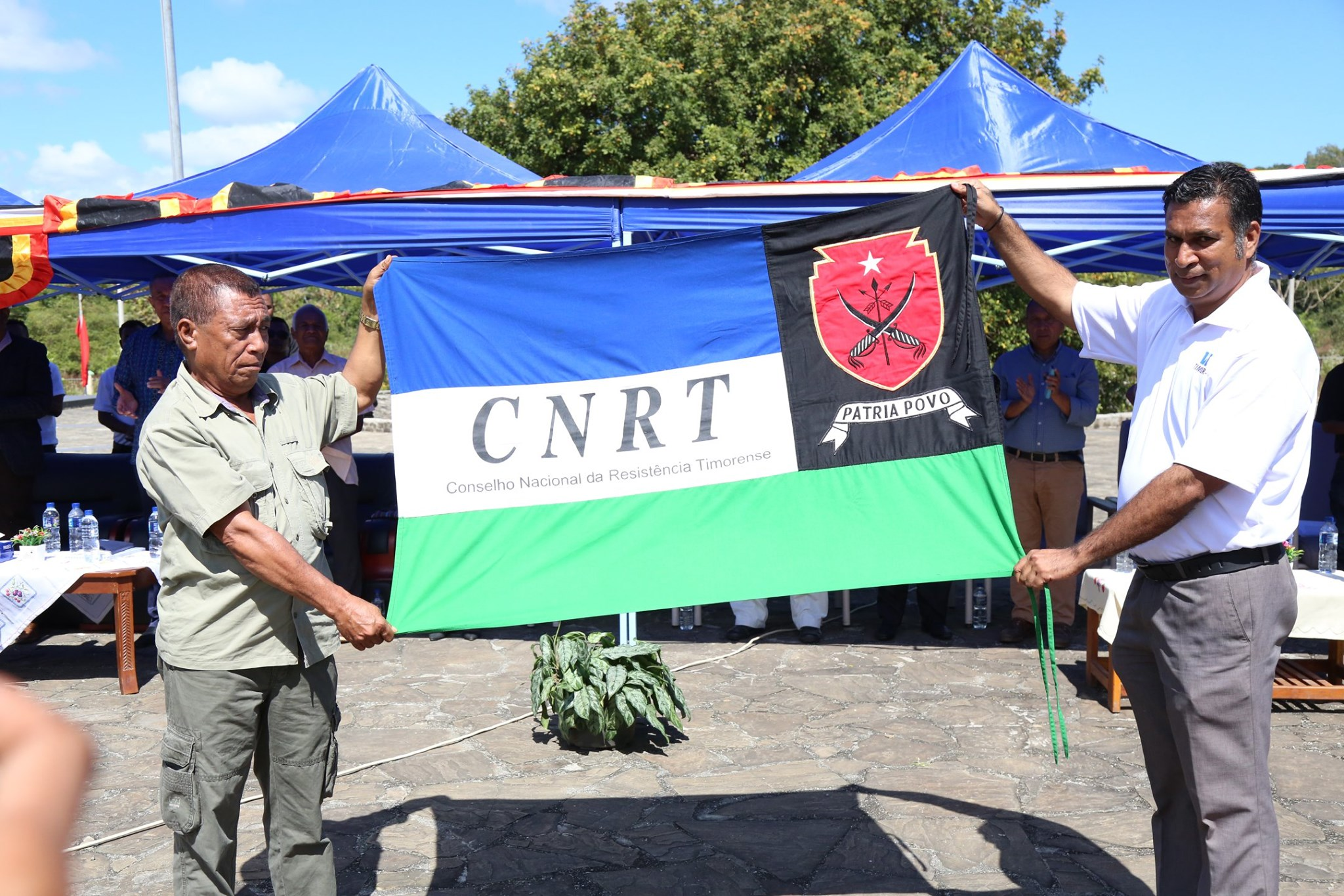 Flagge des Conselho Nacional de Resistência Timorense bei Feierlichkeiten im Parque Dom Boaventura